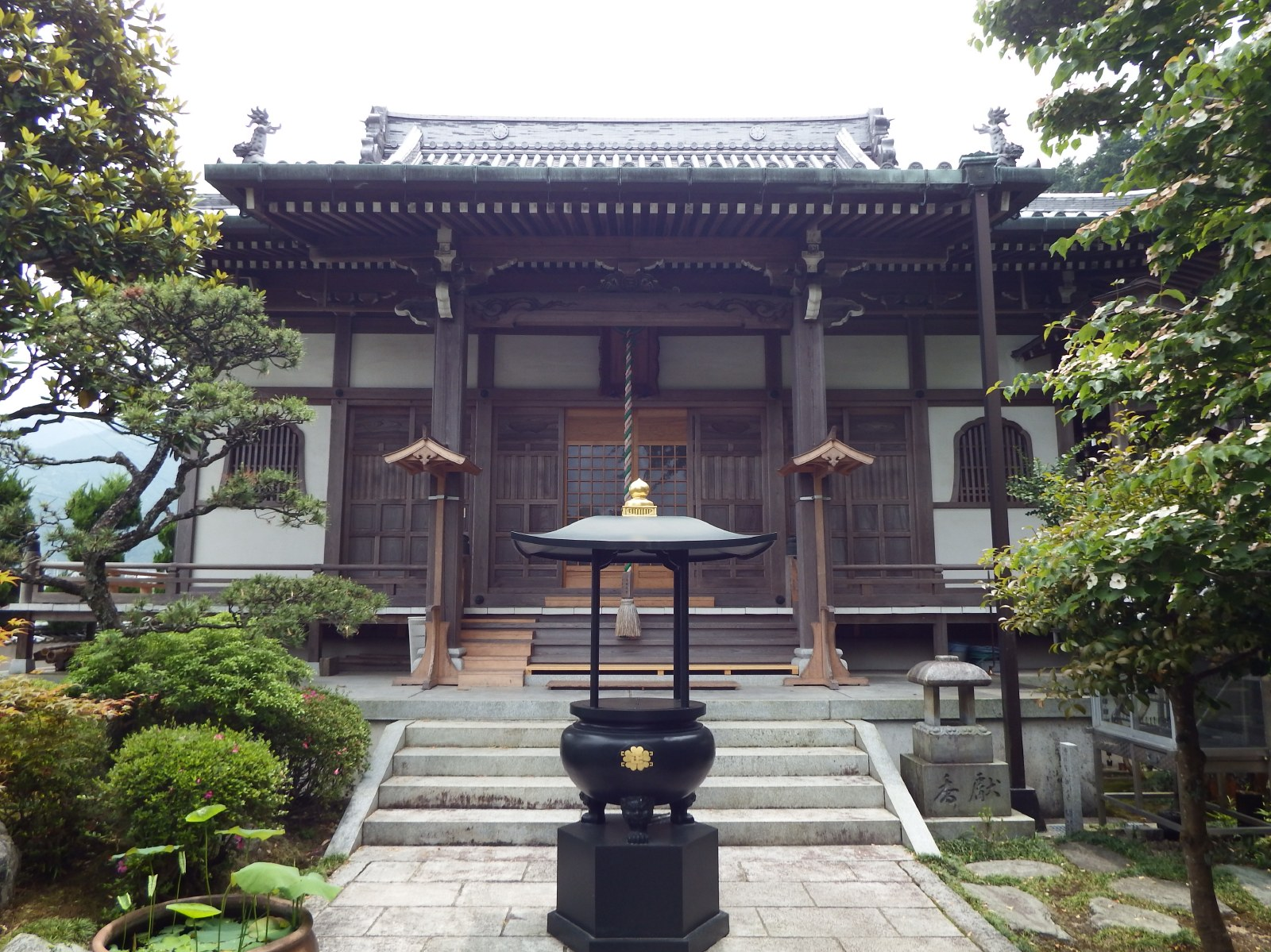 正法寺の本堂